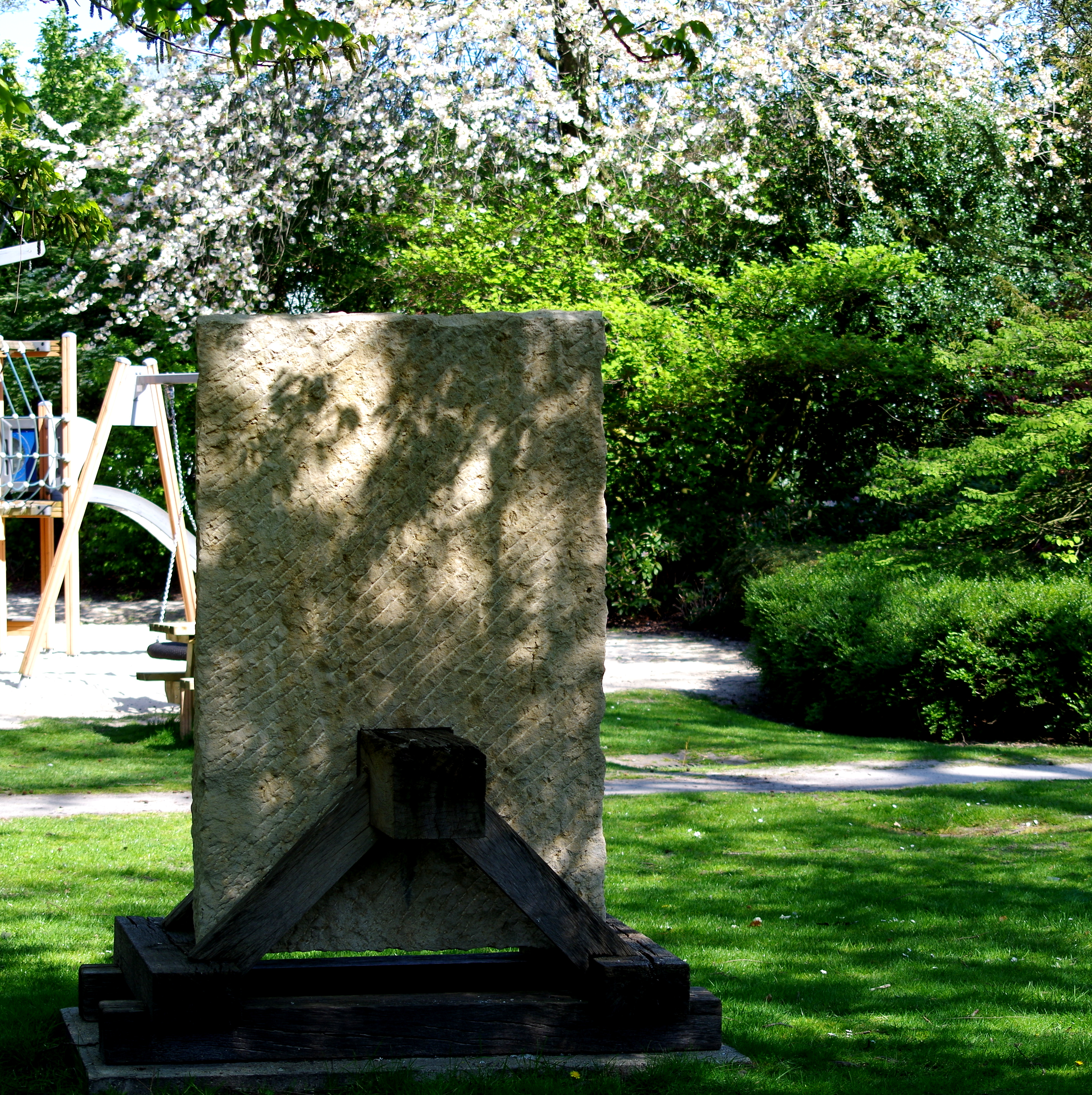 In het Prins Bernhardplantsoen staat het kunstwerk Monopoliet van Ubbo Scheffer